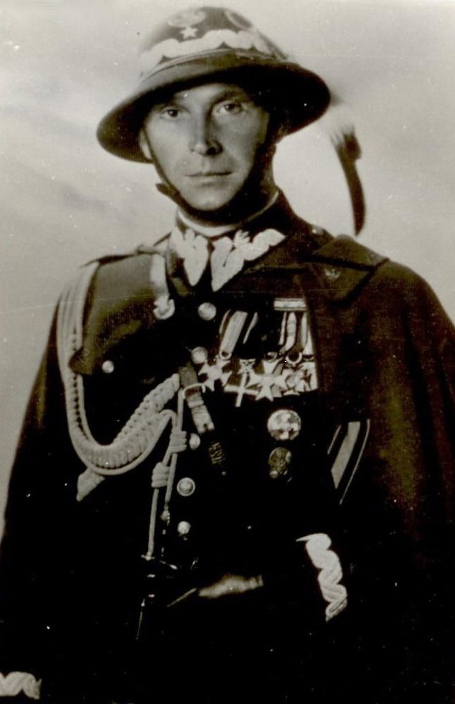 Gen. bryg. Mieczysław Boruta-Spiechowicz, dowódca GO "Bielsko"